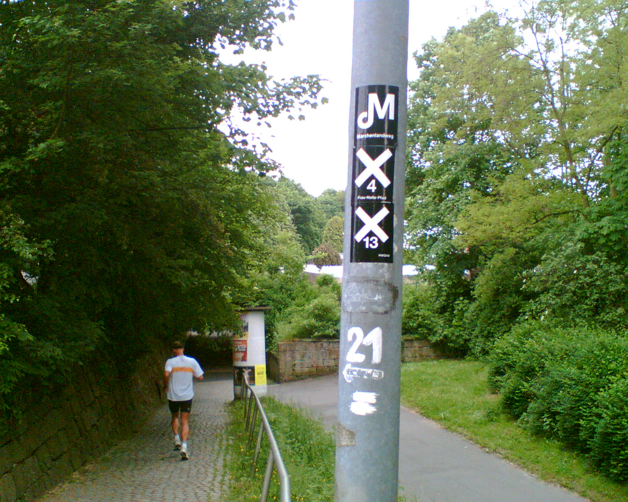 Durchgangswanderwege in Hann. Münden, Vor der Bahn, Germany